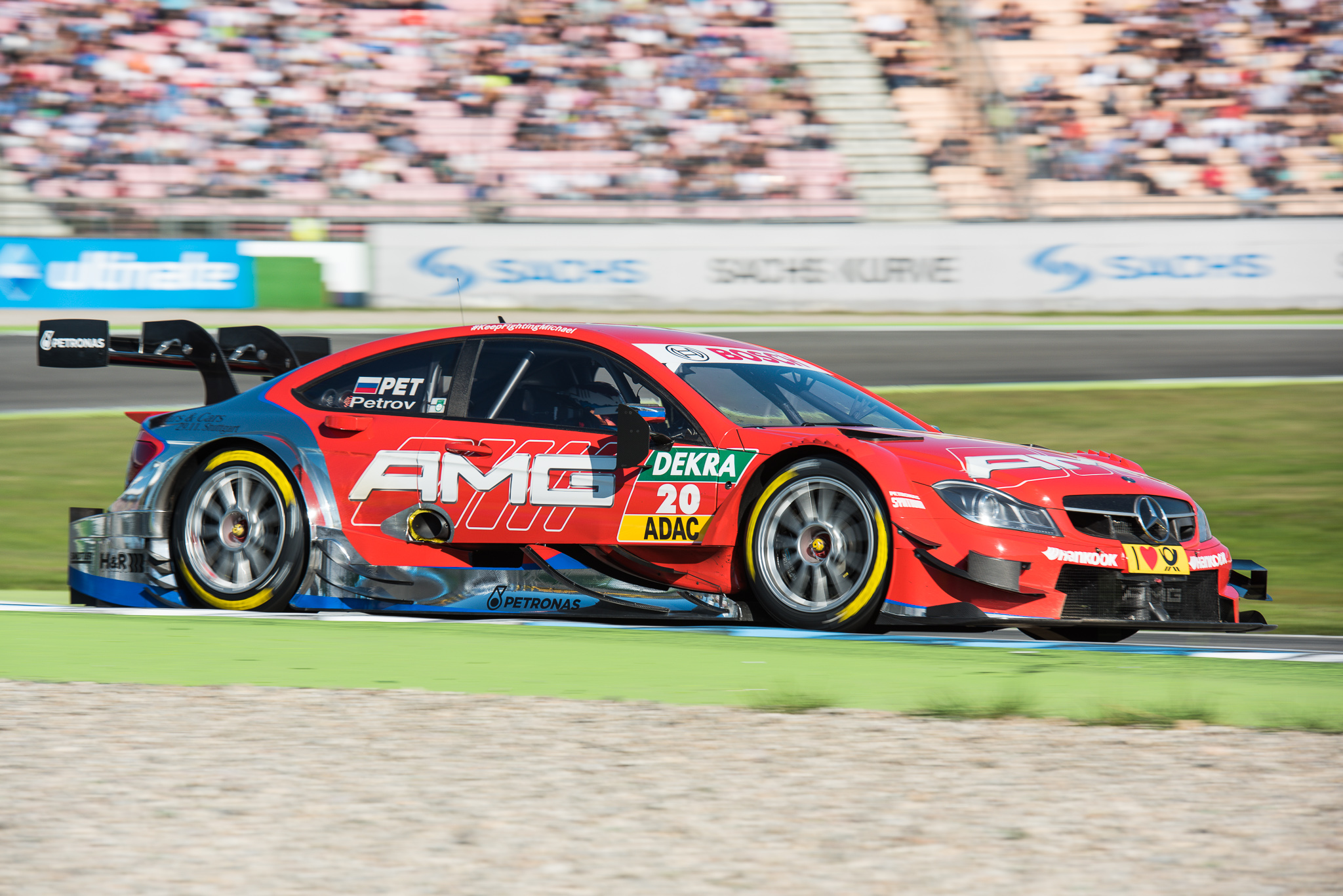 DTM,Deutsche Tourenwagen Masters,Hockenheimring,Mercedes AMG C-Coupe,Motorsport,Mücke Motorsport,Vitaly Petrov